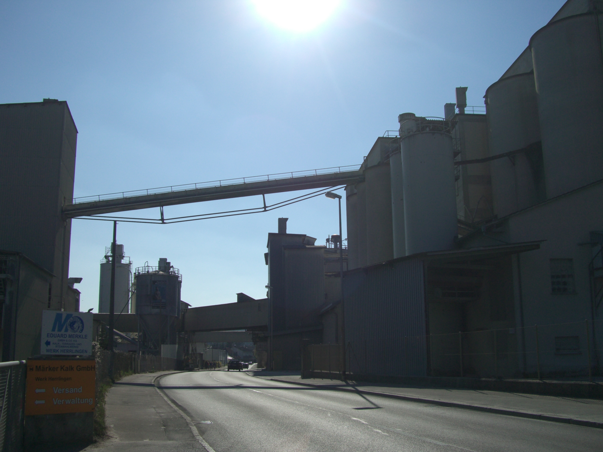 Ansicht der ehemaligen Anlagen des Steinbruchs am östlichen Ortsrand von Herrlingen. In der Bildmitte die Bundesstraße 28 in Richtung Blaubeuren. Diese Anlagen wurden vor 2015 vollständig zurückgebaut.